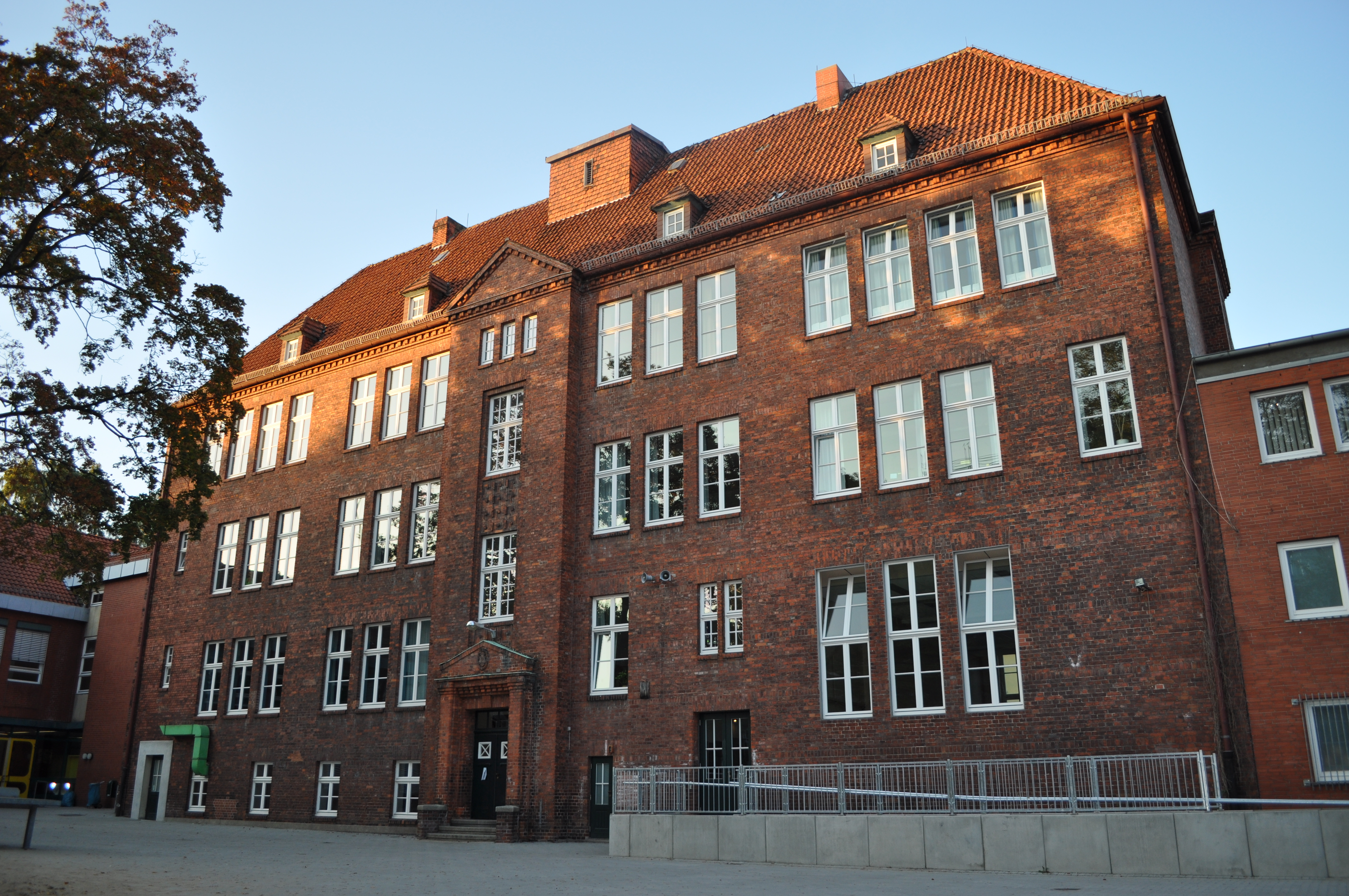 Hilfsschule in Bremen, Gothaer Straße o.Nr..Das abgebildete Objekt ist ein geschütztes Kulturdenkmal in der Freien Hansestadt Bremen, mit der Nr. 0452 beim Landesamt für Denkmalpflege registriert.